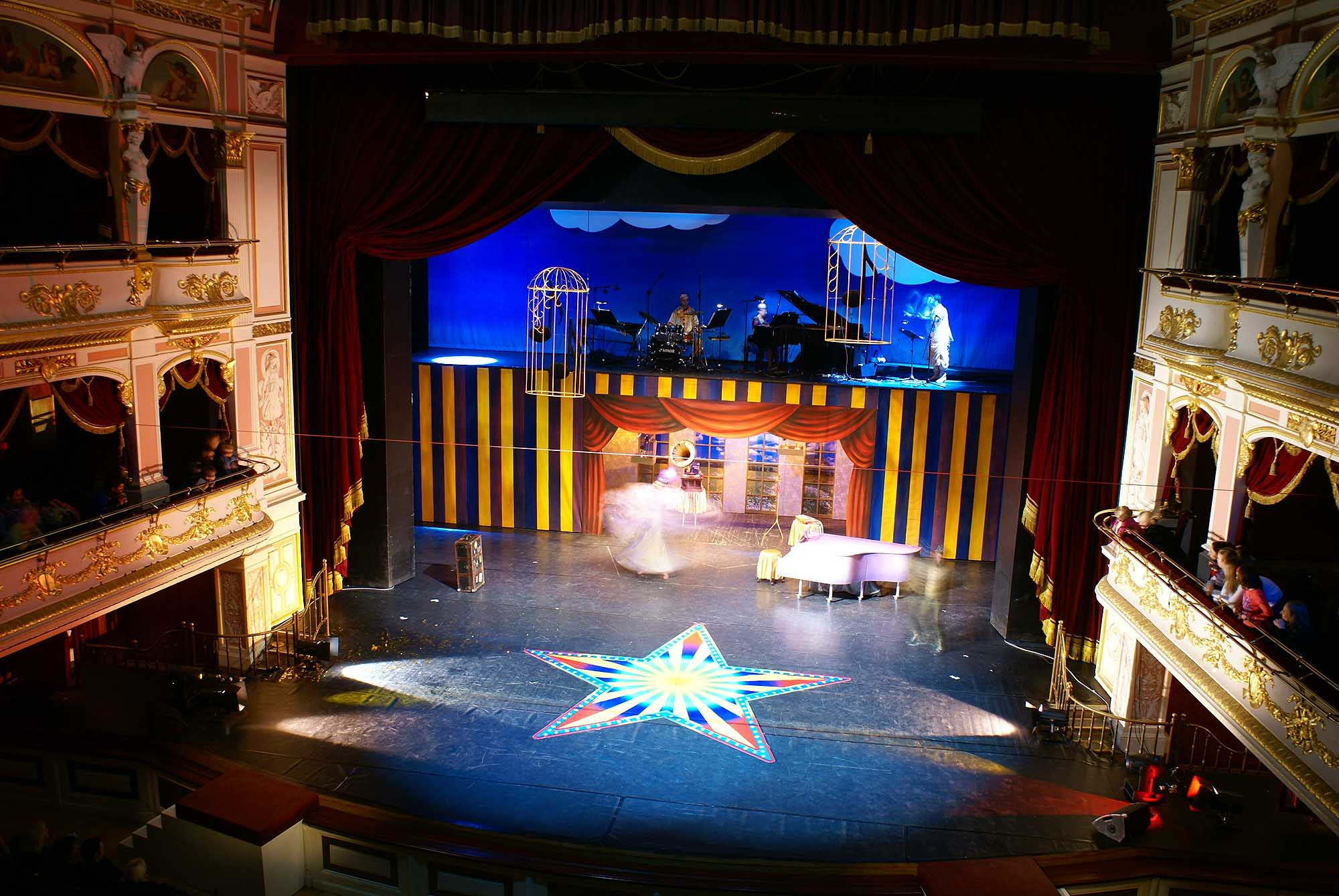 Wrocław, opera, 1837, 1871, 1955